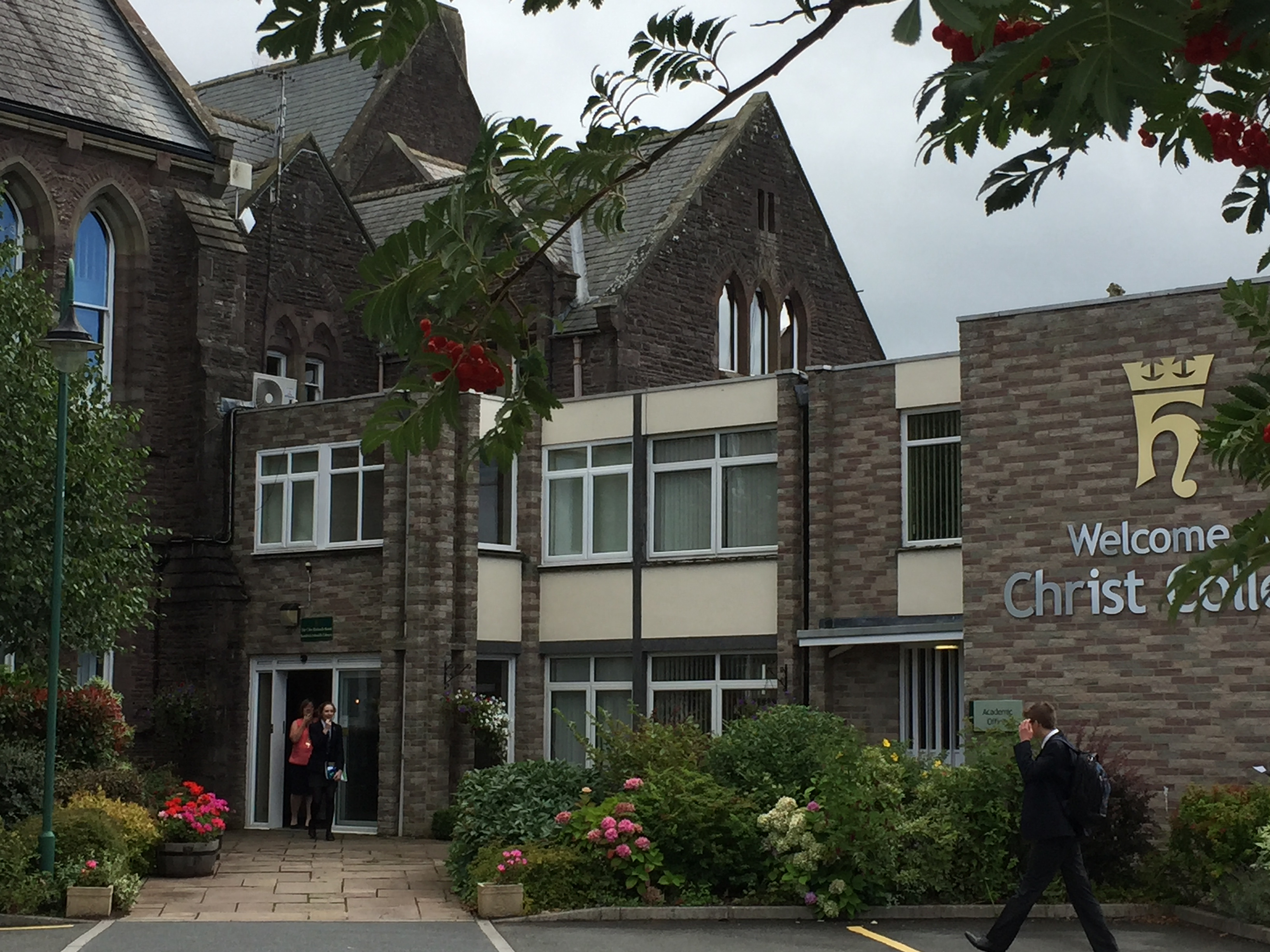 building